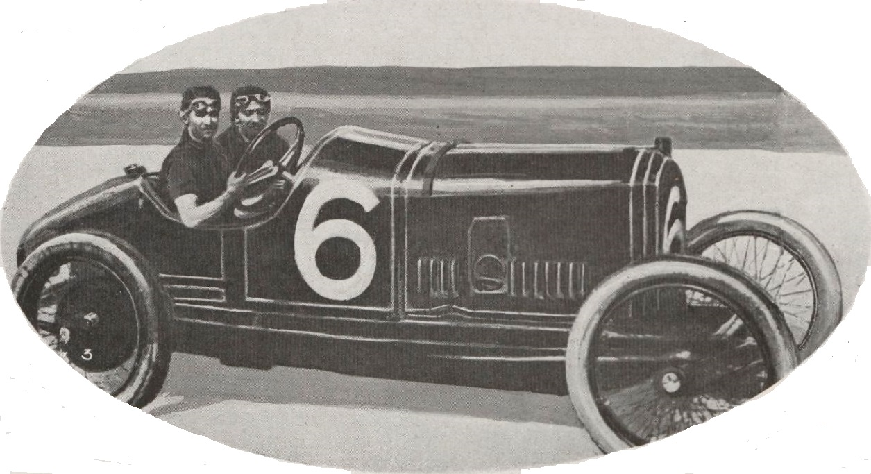 Jules Goux, troisième des 500 Milles d'Indianapolis 1919, sur la Peugeot 4.5L n°6.